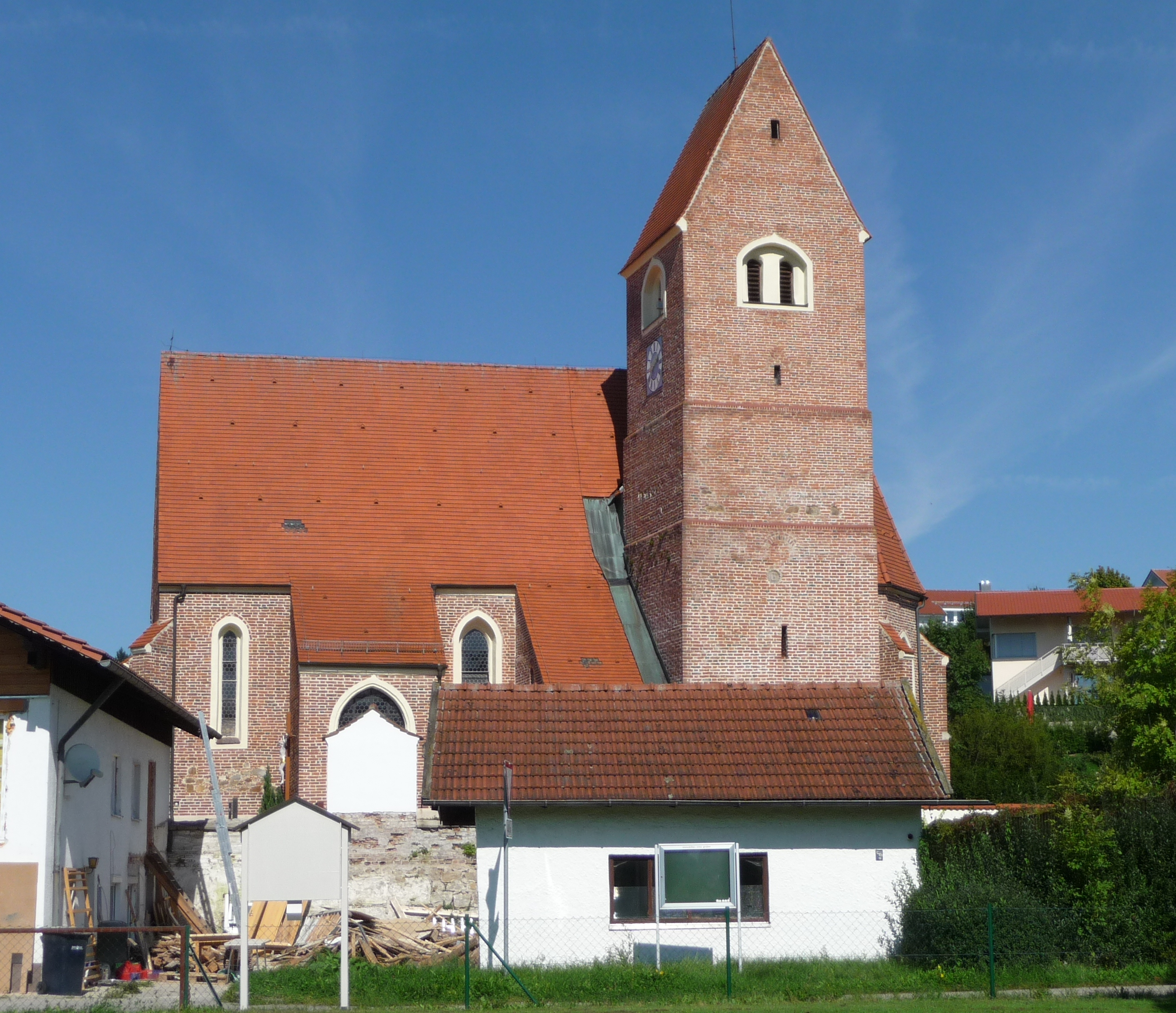 Die Pfarrkirche St. Andreas in Oberuttlau